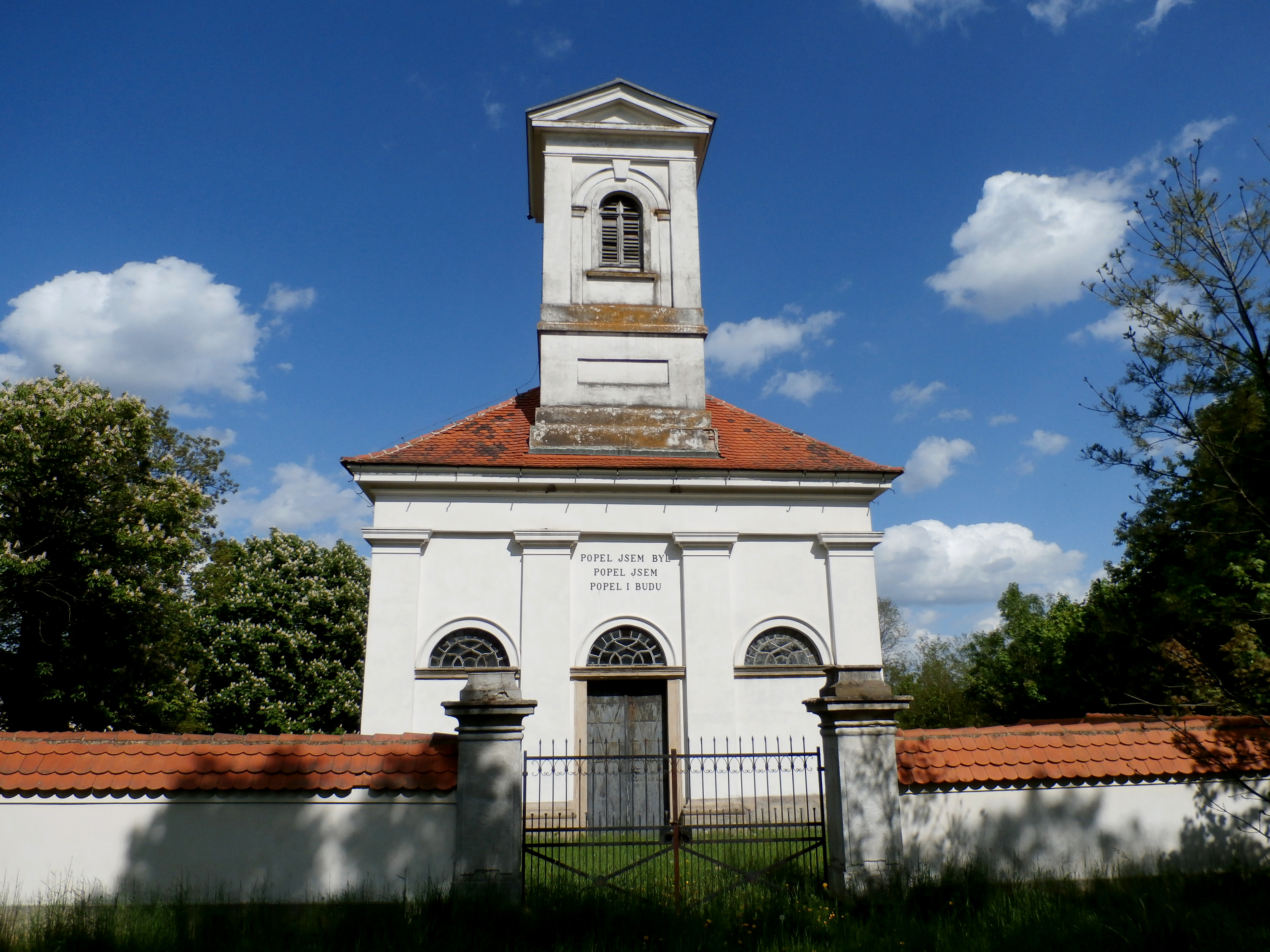 Kaple Narození Panny Marie s rodinnou hrobkou Lobkowiczů na jižním okraji Křimic .